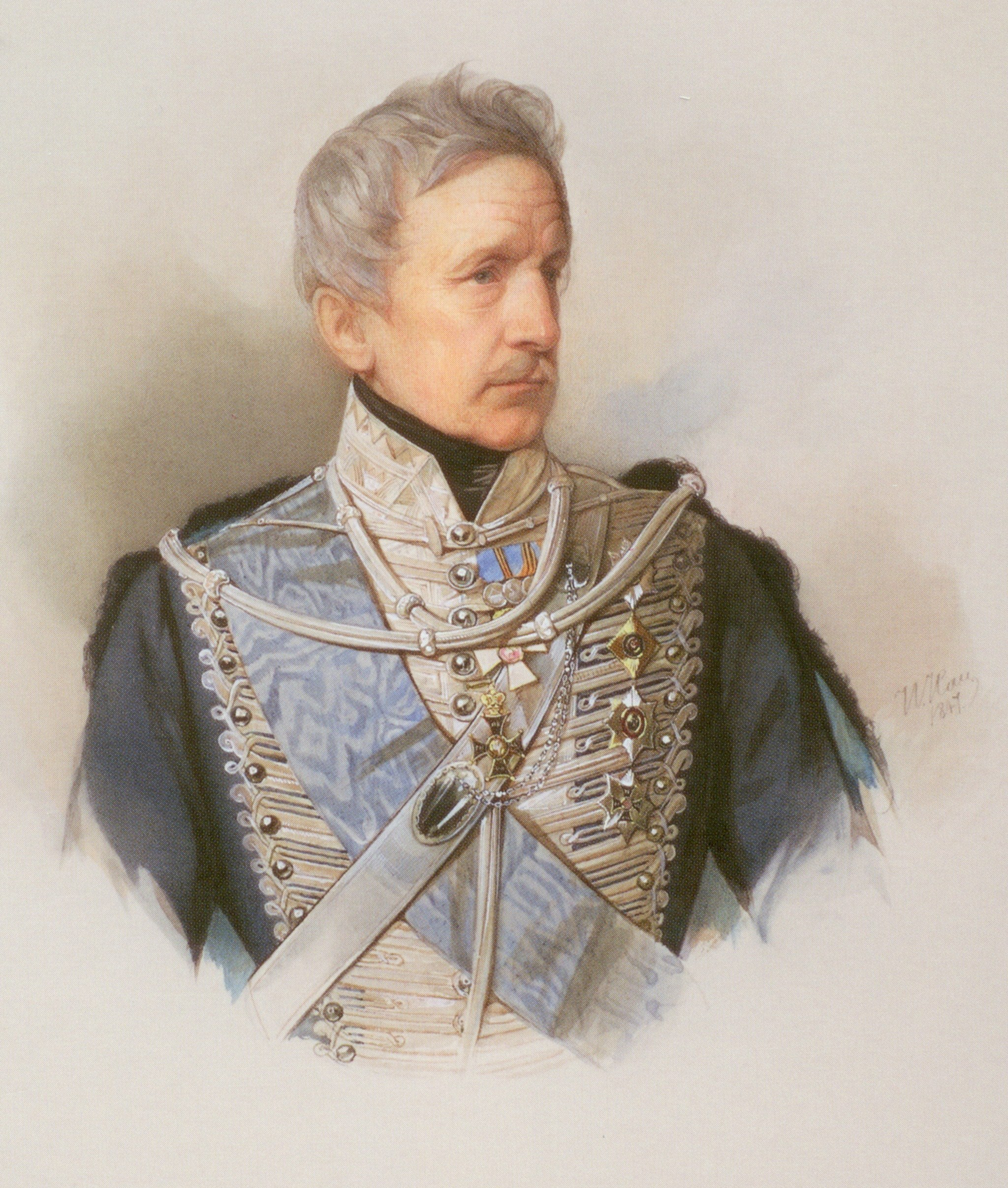 Граф Петр Петрович Пален (1777-1864)